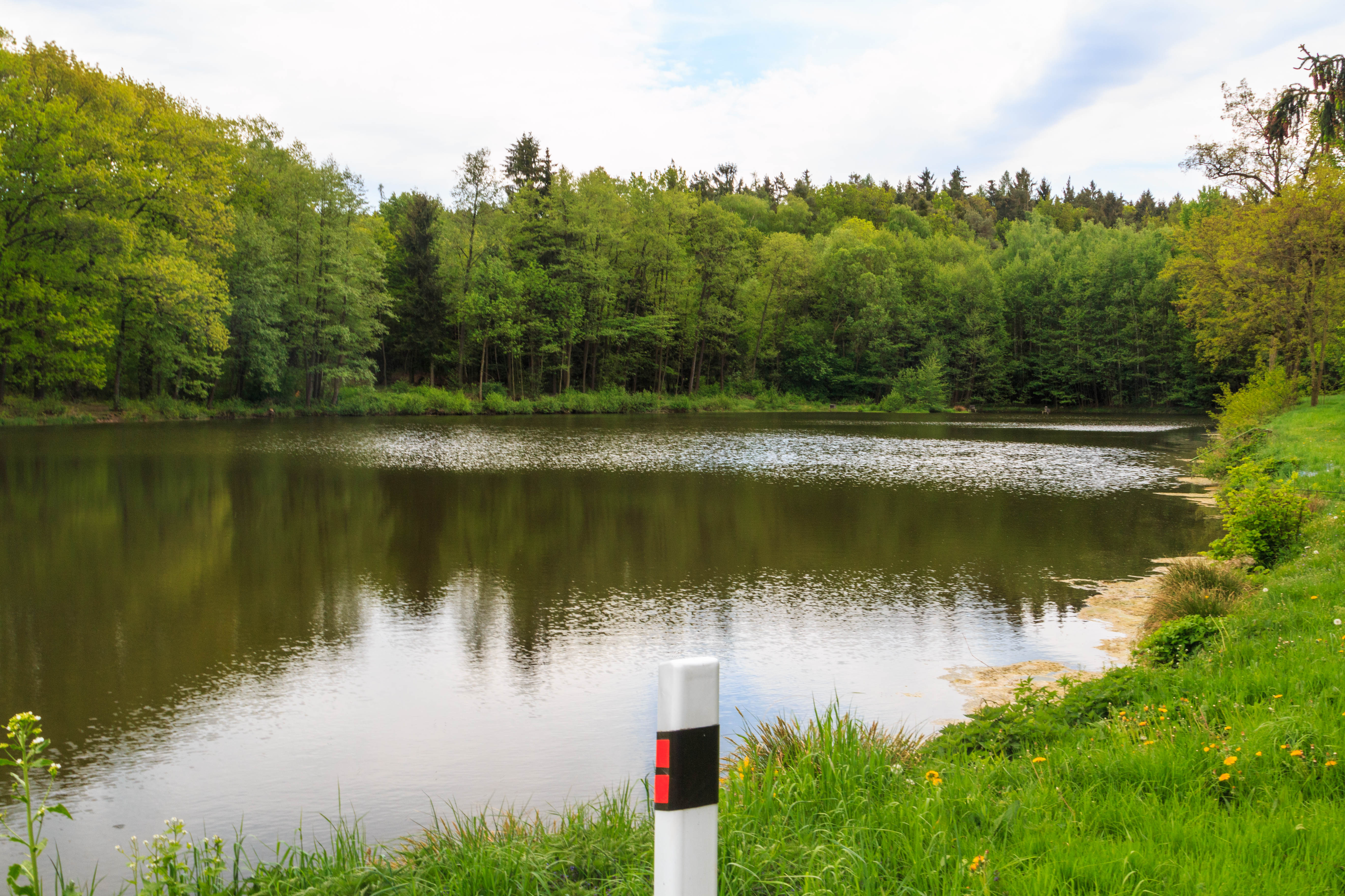 Vlastějovský rybník Project: Vodstvo.